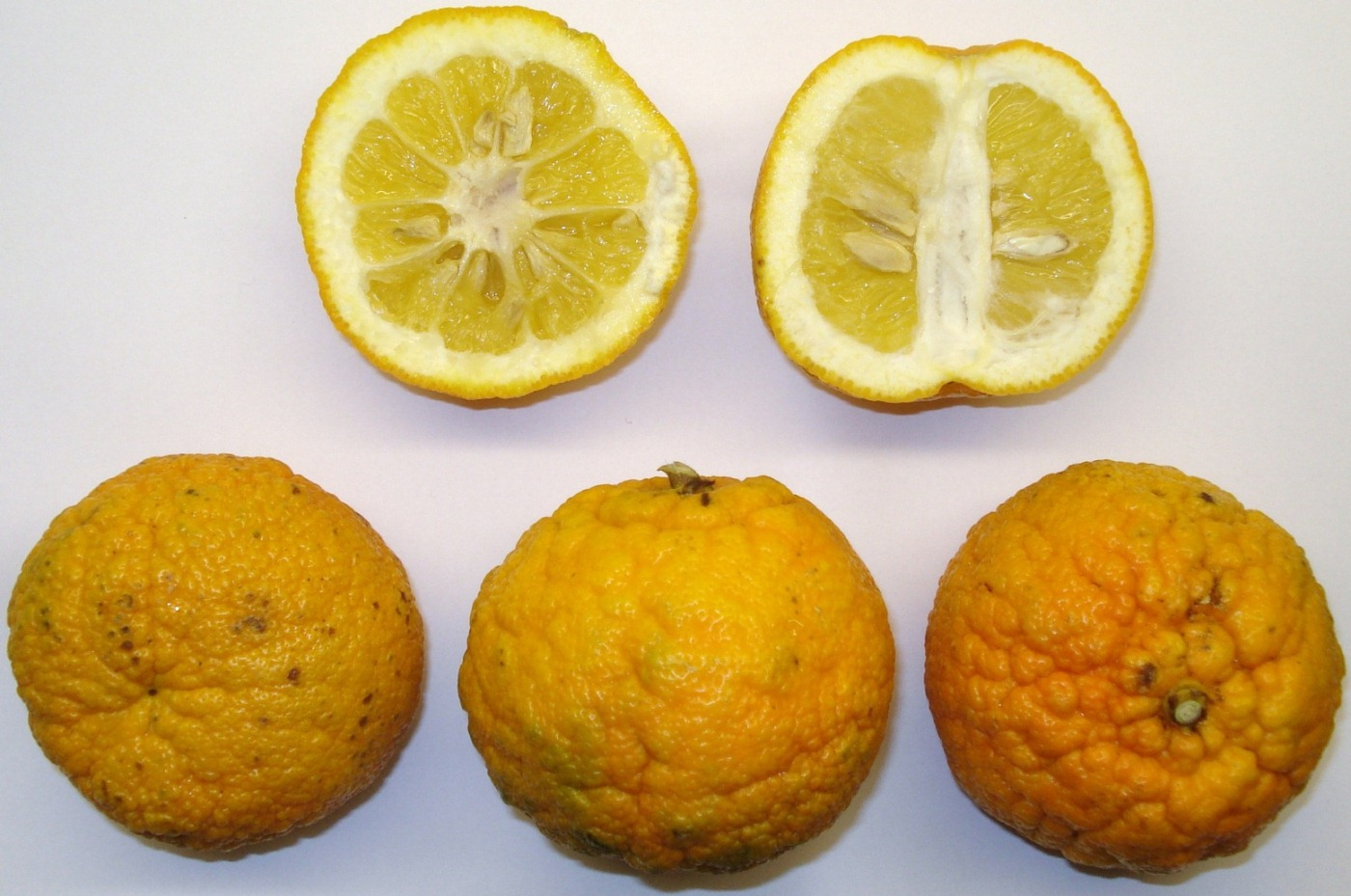 Citrus × aurantium - Bitterorangen